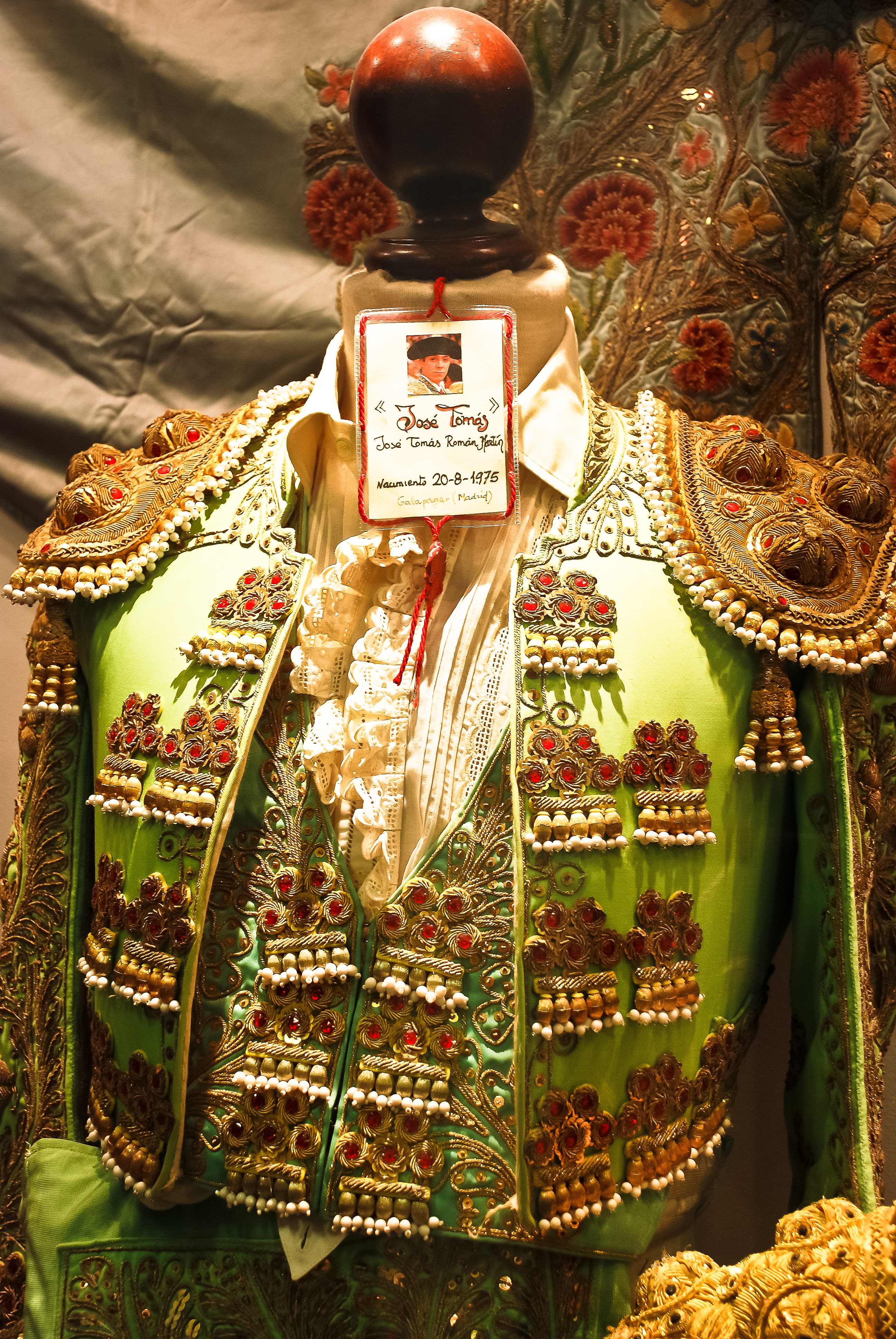 Museo Taurino de Córdoba (España).